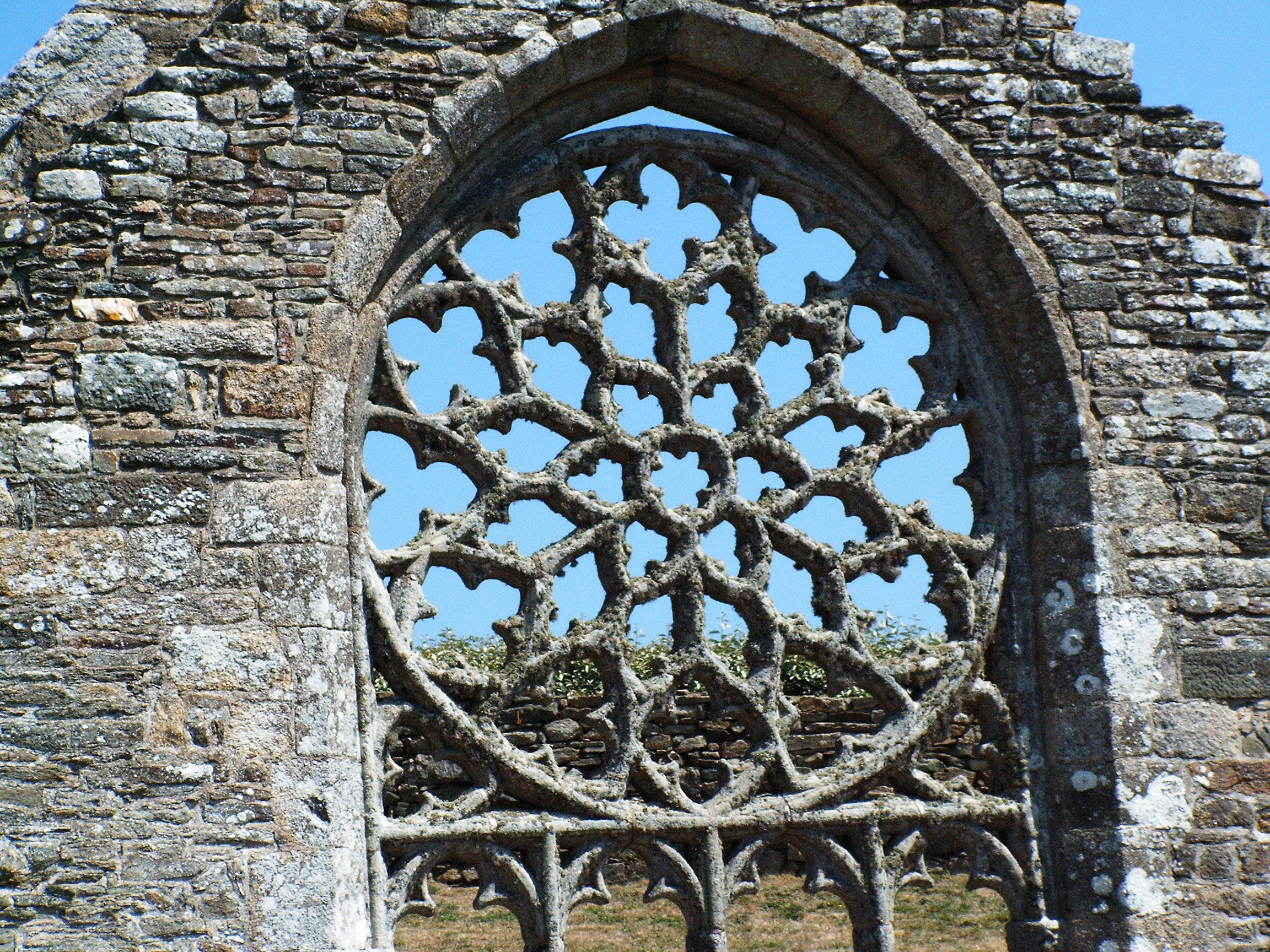 Fensterrosette der Ruine der Chapelle de Languidou, Plovan, nahe Pont l'Abbé